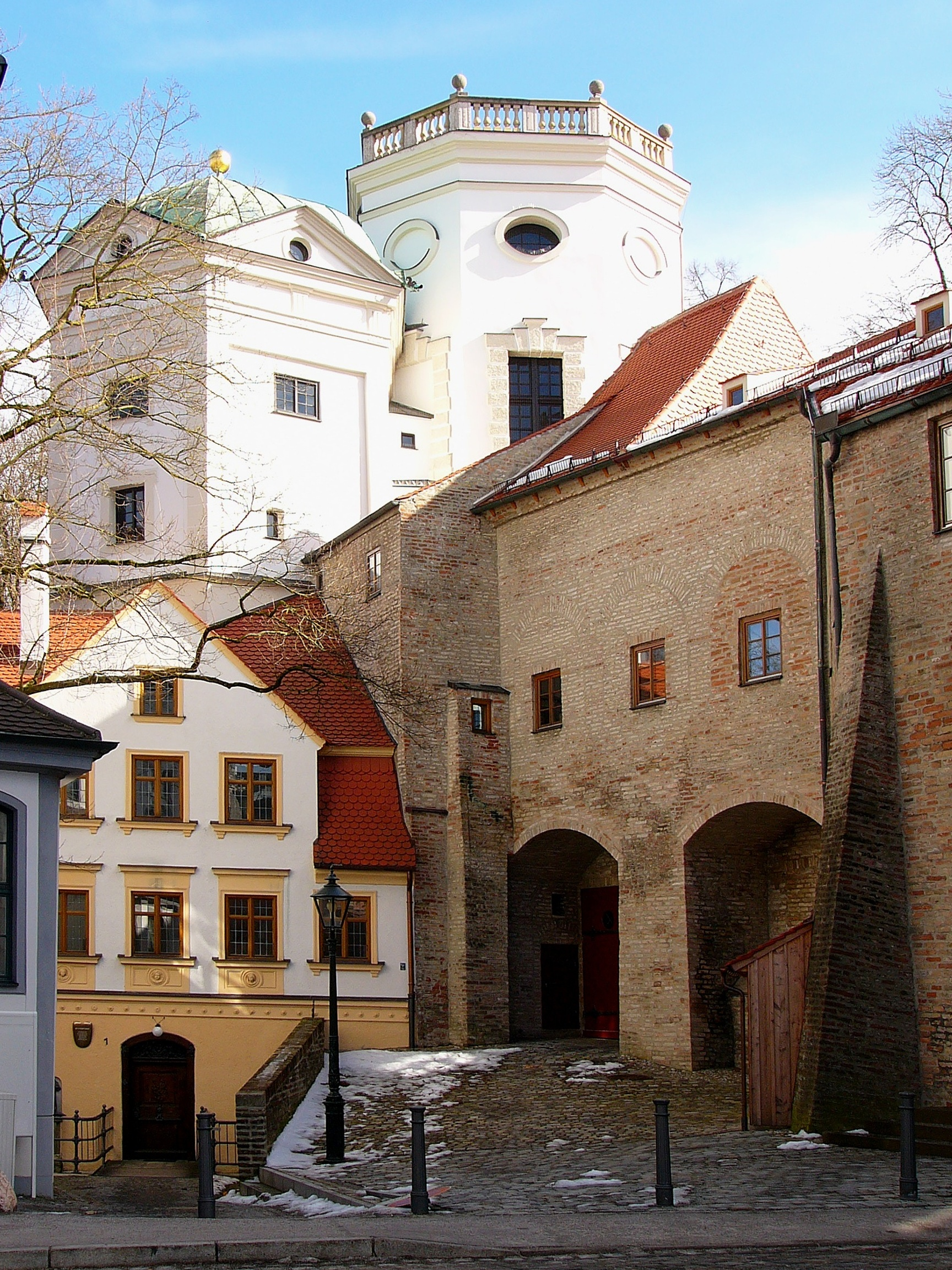 Großer und kleiner Wasserturm, Brunnenmeisterhäuser. Großer Wasserturm, quadratischer Unterbau mit Eckrustika, oktogonaler Aufsatz mit querovalen Öffnungen und abschließender Balustrade, Unterbau 1463, Aufstockung 1669, Innenausbau um 1746; Kleiner Wasserturm, quadratischer Unterbau mit nordöstlicher Strebemauer, sechseckiger Aufsatz mit Putzgliederung und Haube, Unterbau 1470, Aufbau 1559, letztes Obergeschoss und Haube 1672, Innenausbau 1744; Ehem. Oberes Brunnenmeisterhaus, zweigeschossiger Mansarddachbau mit Zwerchhaus, im Kern 17. Jahrhundert, äußere Erscheinung 18. Jahrhundert, klassizistische Dekoration des 19. Jahrhundert; Nicht sichtbar auf diesem Foto: Ehem. Unteres Brunnenmeisterhaus, jetzt Schwäbisches Handwerkermuseum, zweigeschossiger Walmdachbau mit geschweifter Uhrengaube und seitlichem Anbau mit Pultdach, an die Stadtmauer gebaut, 17. Jahrhundert, Fassade von Christian Dominikus Erhart 1777.This is a photograph of an architectural monument.